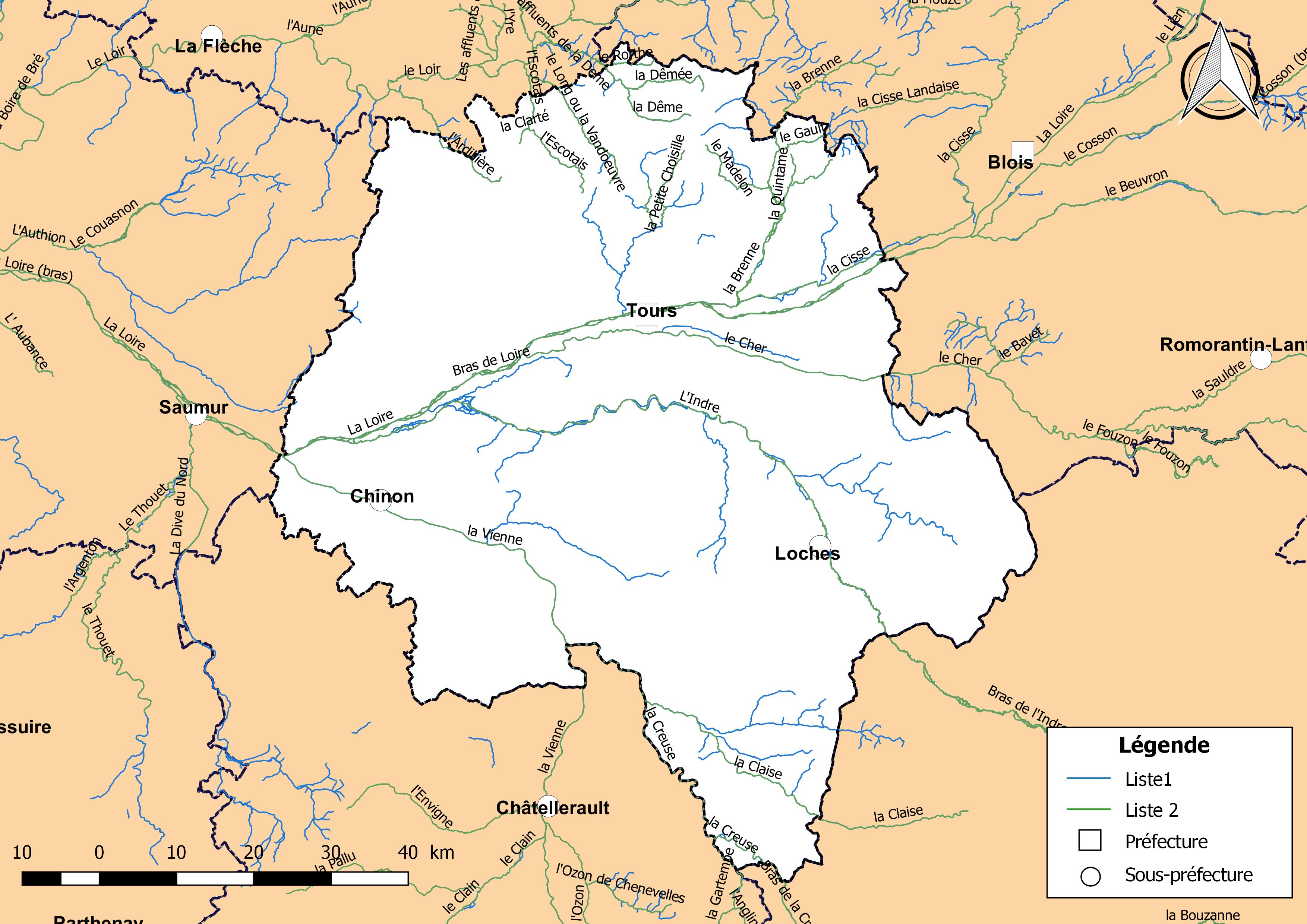 Classement des cours d'eau du département de l'Indre-et-Loire (France) au titre de la continuité écologique (article L214.17 I du Code de l'environnement).